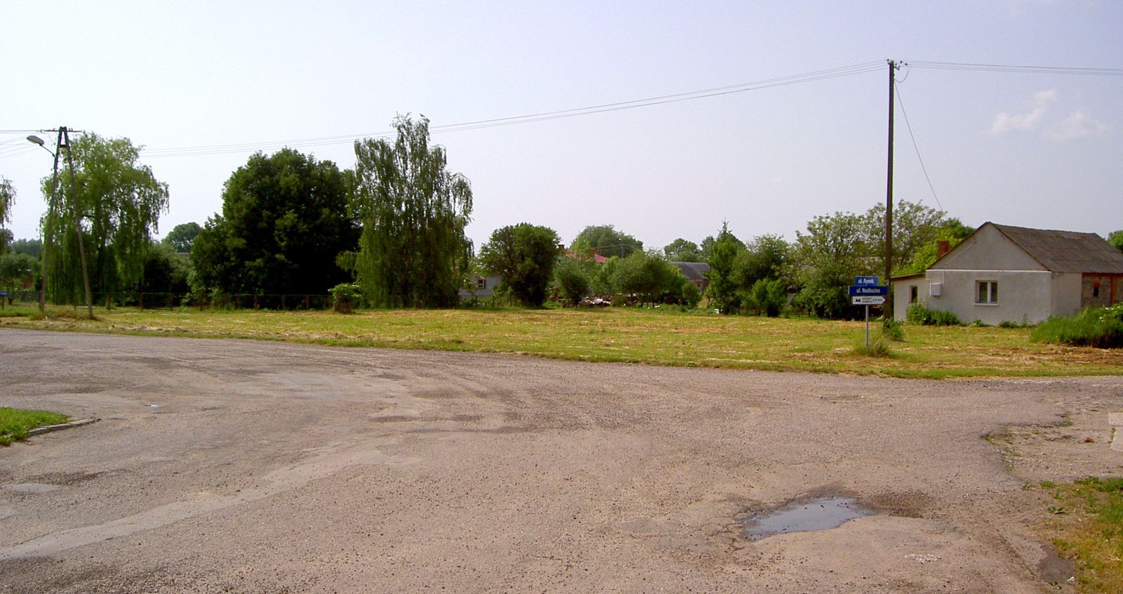 Kryłów, Poland • Rynek / Town Square